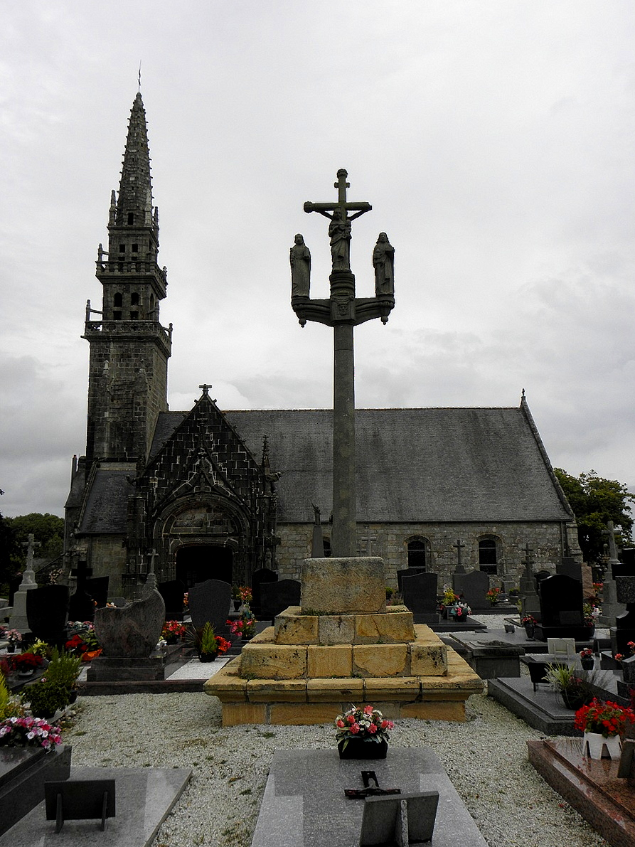 Église Notre-Dame de Pencran (29). Calvaire sud et flanc sud.